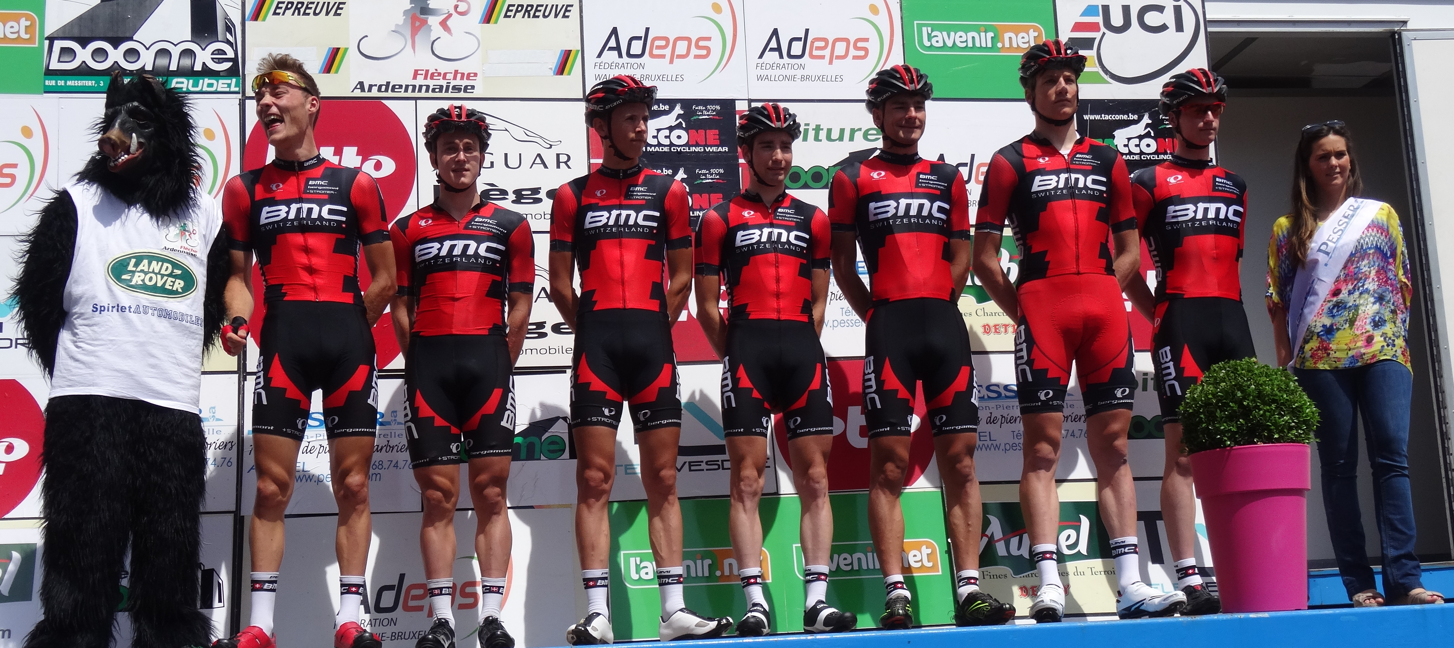 Reportage photographique réalisé le dimanche 22 juin à l'occasion du départ et de l'arrivée de la Flèche ardennaise 2014 à Herve, Belgique.